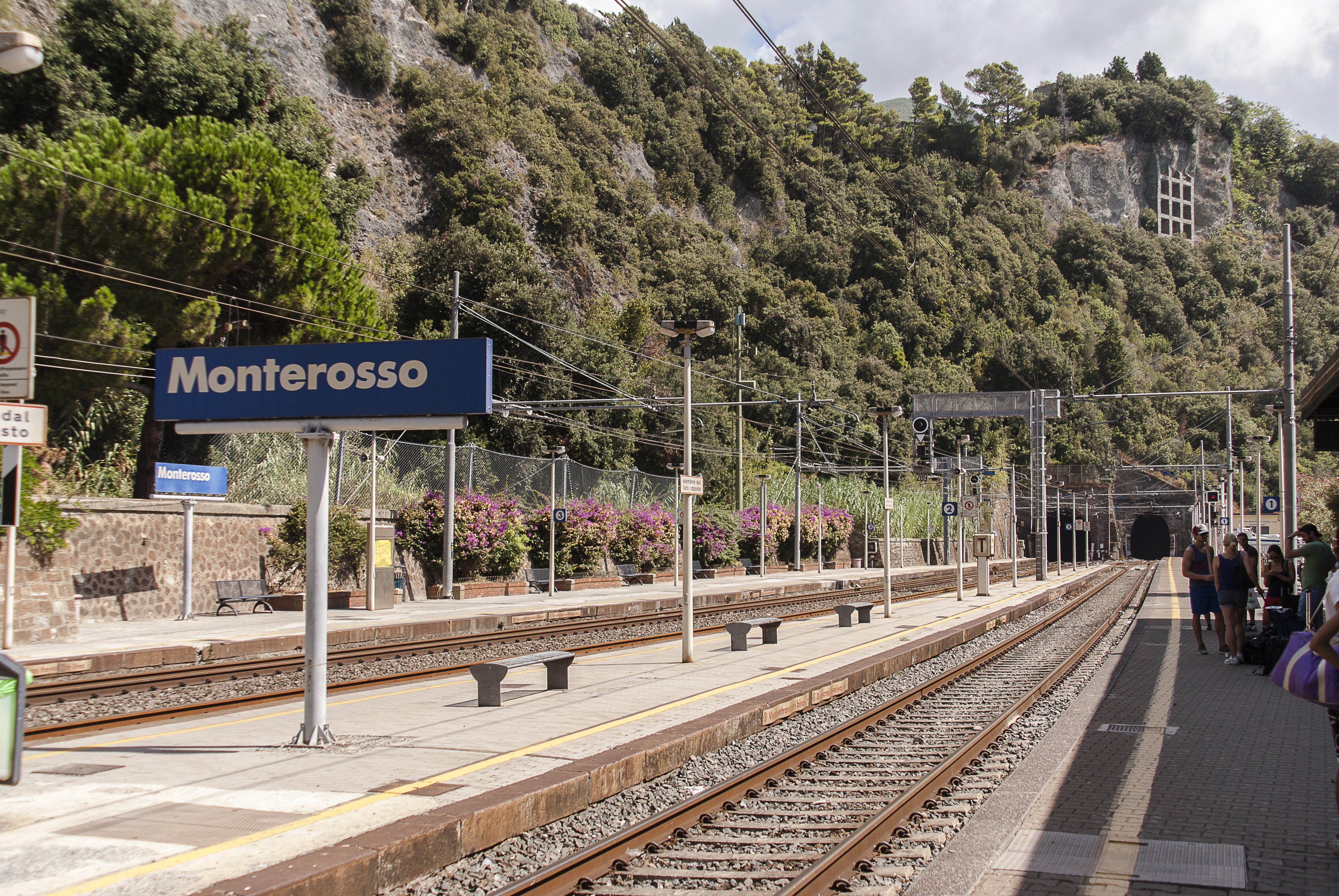 Miasteczko Monterosso w Włoszech